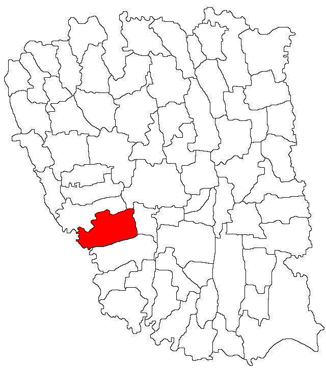 Categorie:Hărţi ale judeţului Galaţi